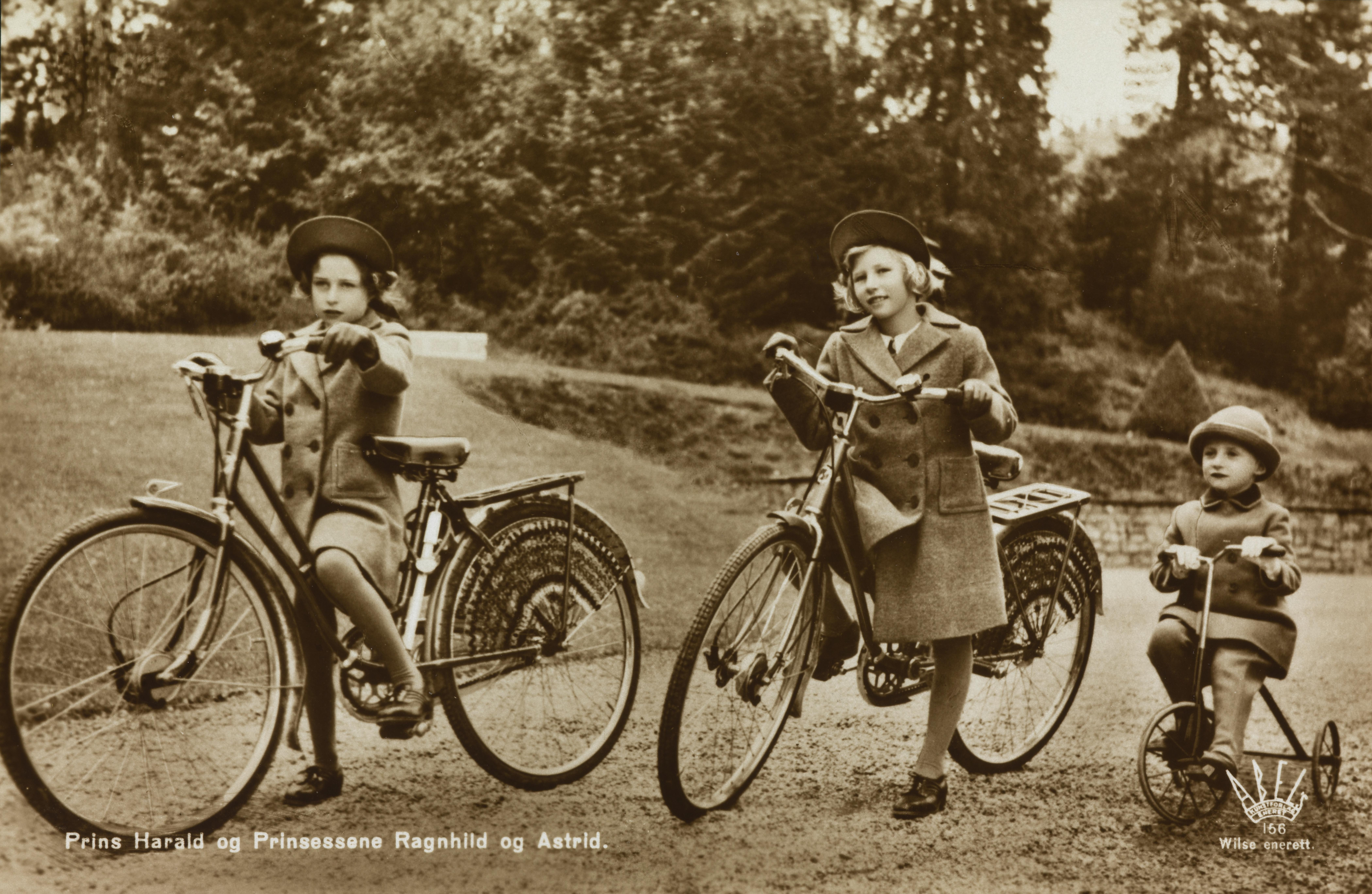 Bildet er hentet fra Nasjonalbibliotekets bildesamling. Anmerkninger til bildet var: Fotografiet tatt på kronprinsparets eiendom Skaugum. Depicted person: Harald V